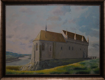 Hrádek u Purkarce, olej na plátně 100x74 cm